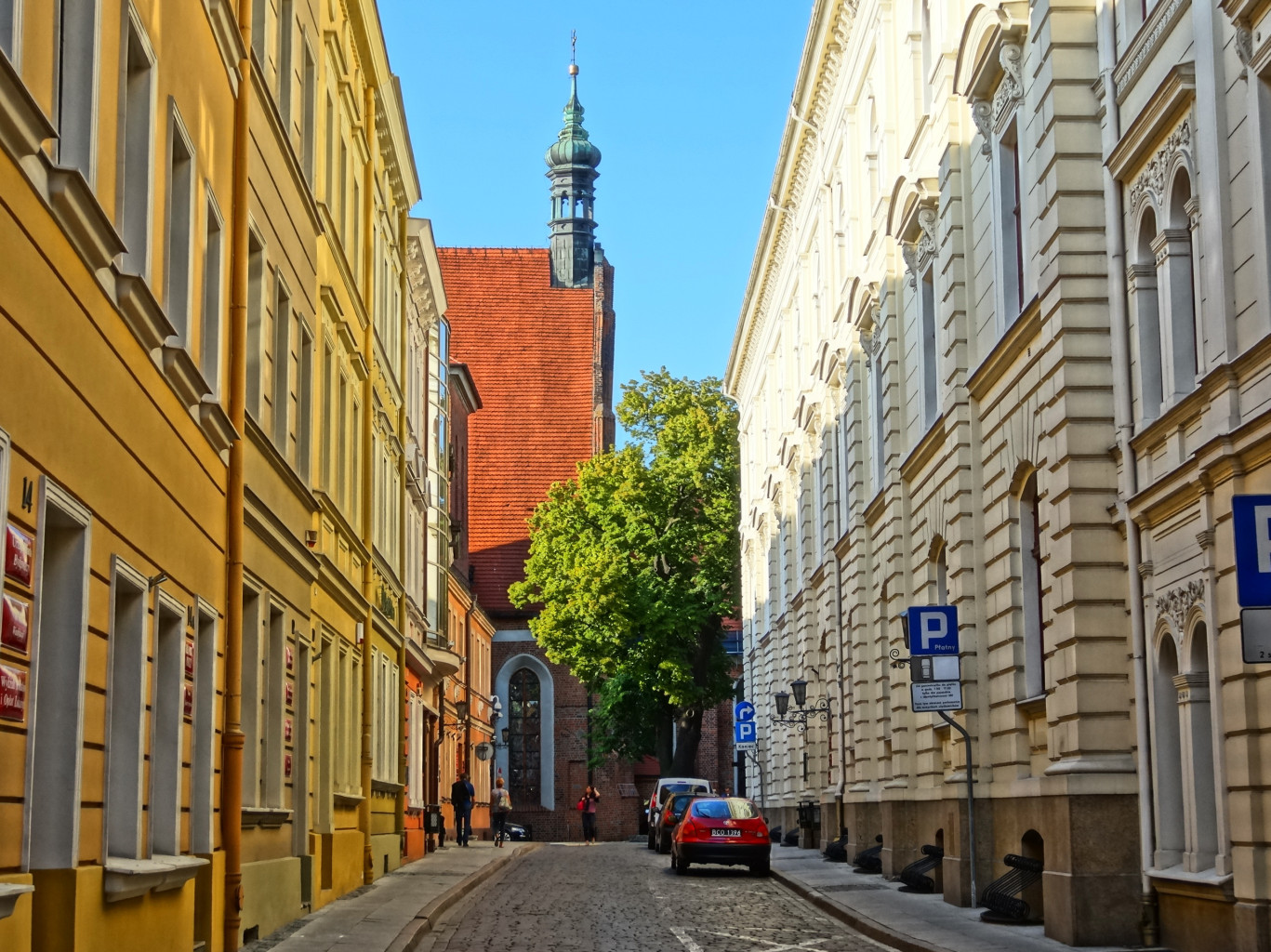 Ulica Jezuicka w Bydgoszczy - widok na północ w kierunku katedry